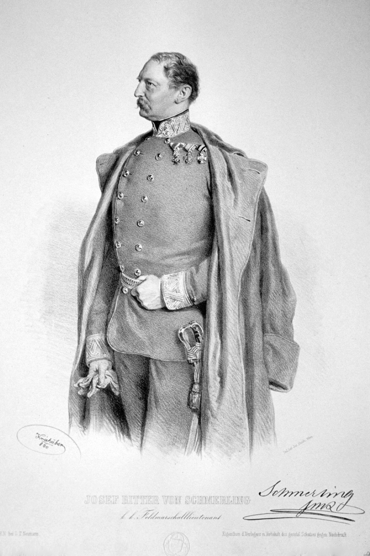 Josef von Schmerling (1806-1884), k. k. Feldzeugmeister, Lithographie von Josef Kriehuber , 1860